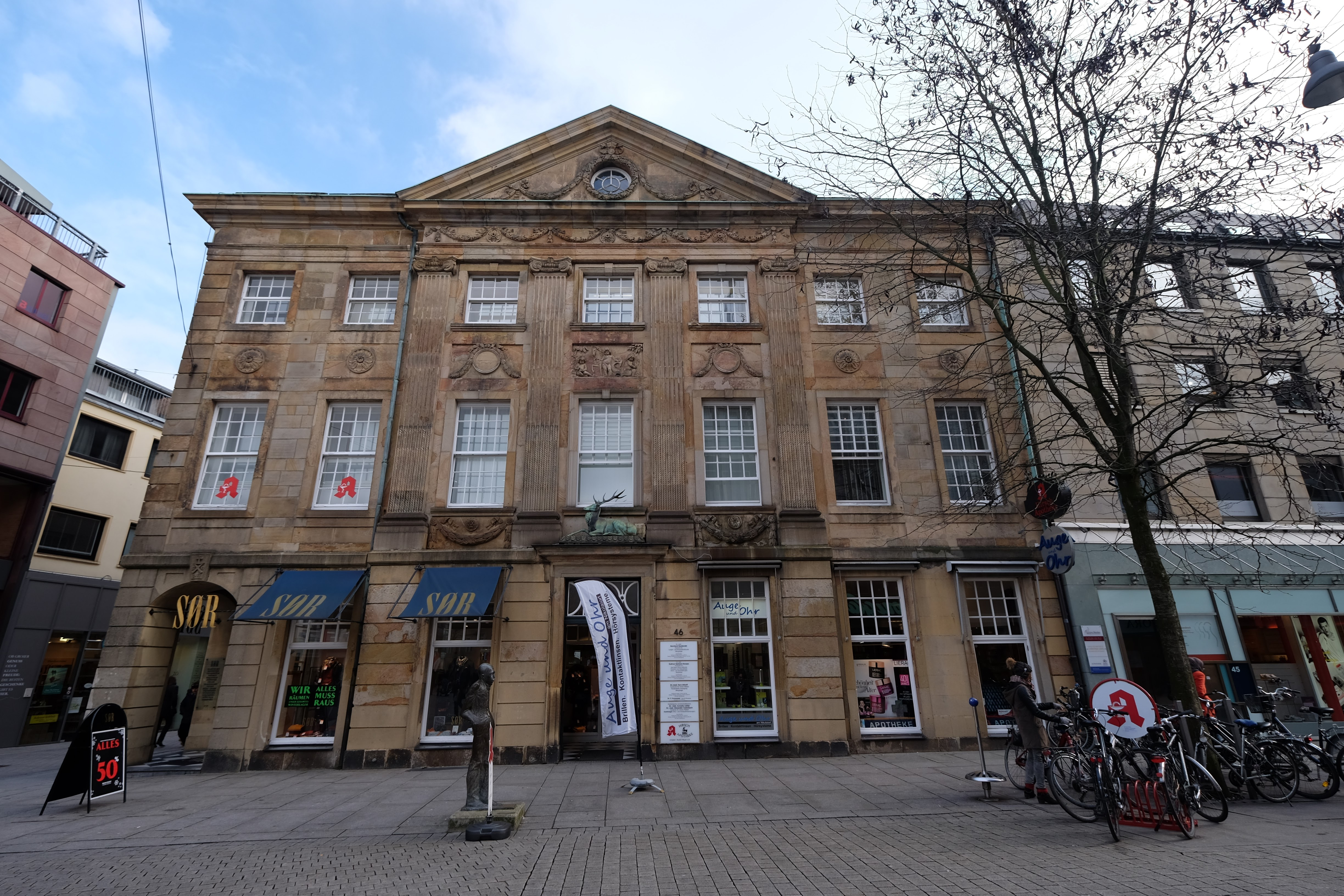 Hirschapotheke in der Innenstadt, 49074 Osnabrück, Germany